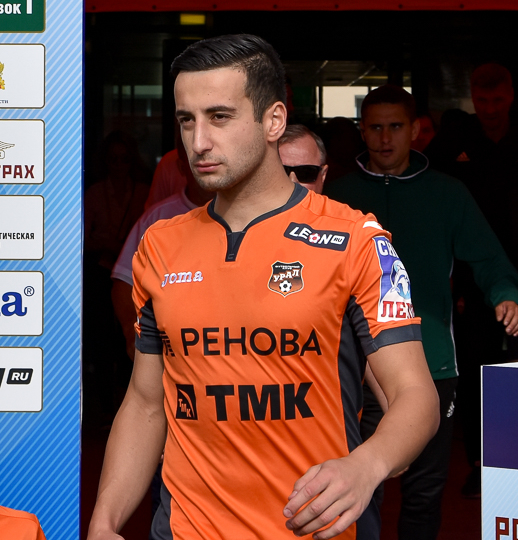 Выход на поле. Матч ЧР 16-17. Урал - ЦСКА. 19.08.2017. СКБ-Банк Арена. Россия, Екатеринбург